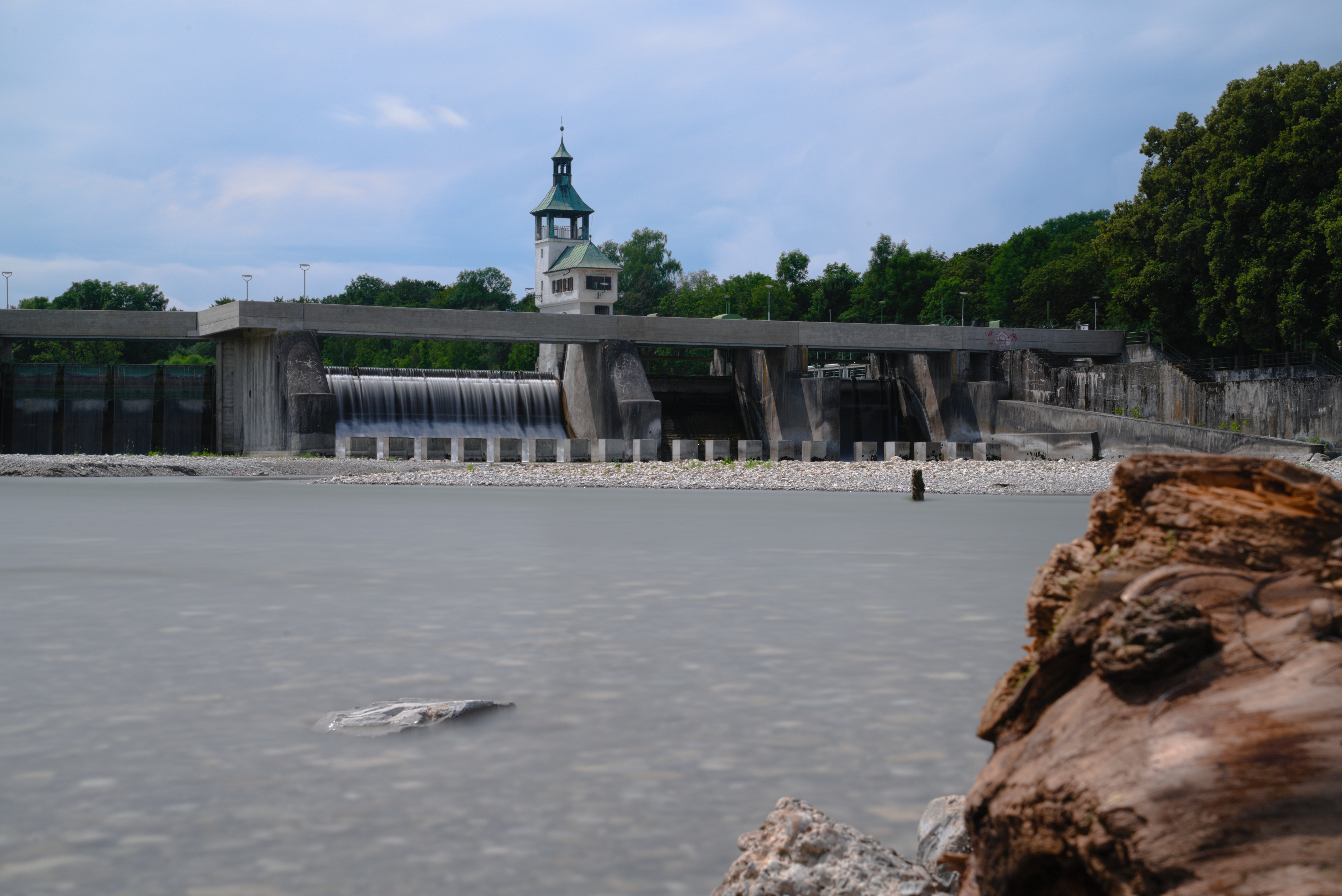 Hochablass von einer nahegelegenen Kießbank.